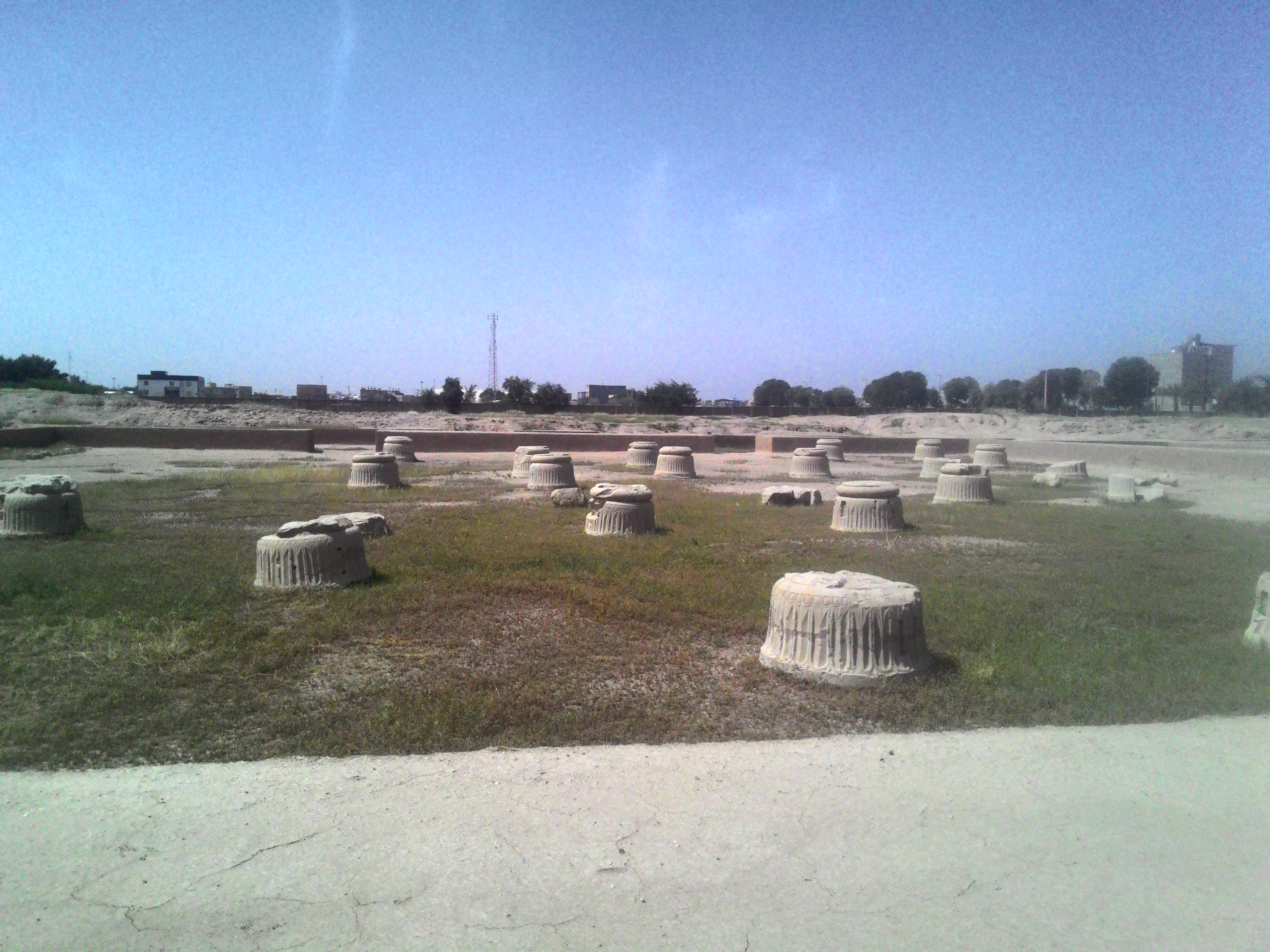 آپادانا